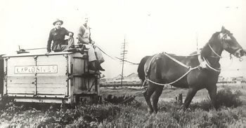 Horse-drawn explosives carrying wagon in the Dry Creek Explosive Magazine in South Australia